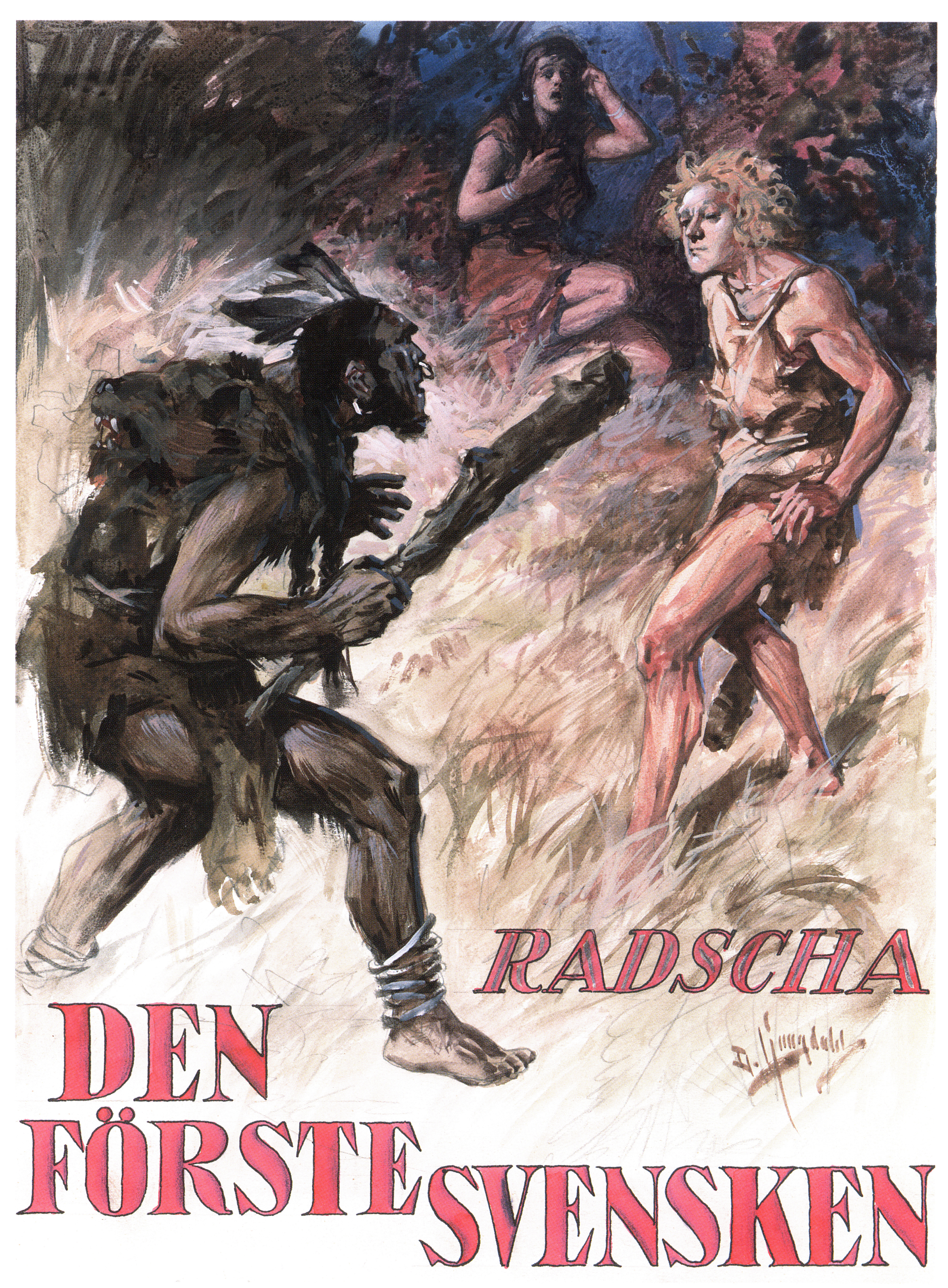 Bokomslag till Radscha, pseudonym för Iwan T. Aminoff - Den förste svensken Artist: David Ljungdahl (1870-1940)